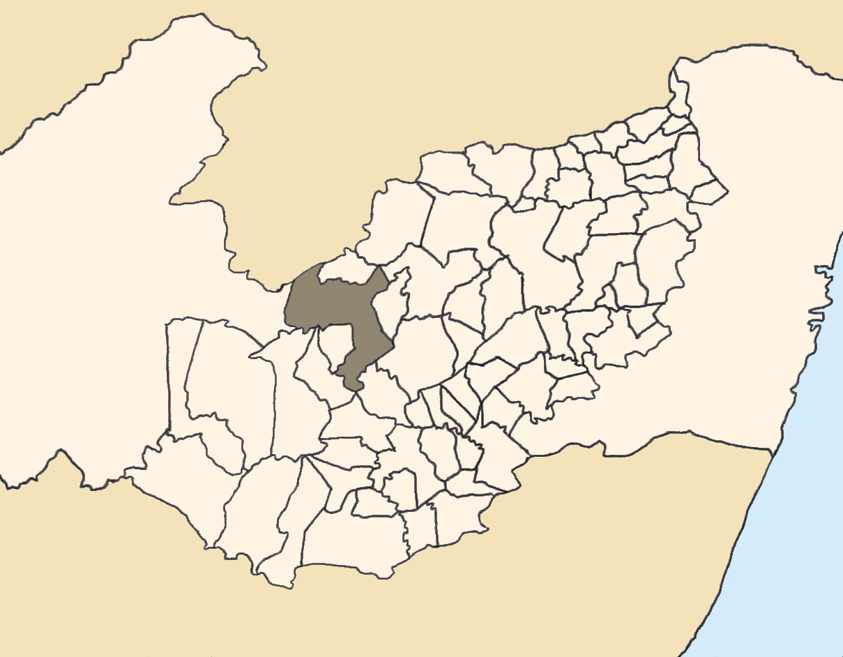 Mapa da mesorregião Agreste de Pernambuco (Brasil) subdivida em municípios. Em destaque, o município de Pesqueira. Map of the brazilian state of Pernambuco (mesorregião Agreste) showing the city of Pesqueira. Imagem tratada com o GIMP. Image made with GIMP.